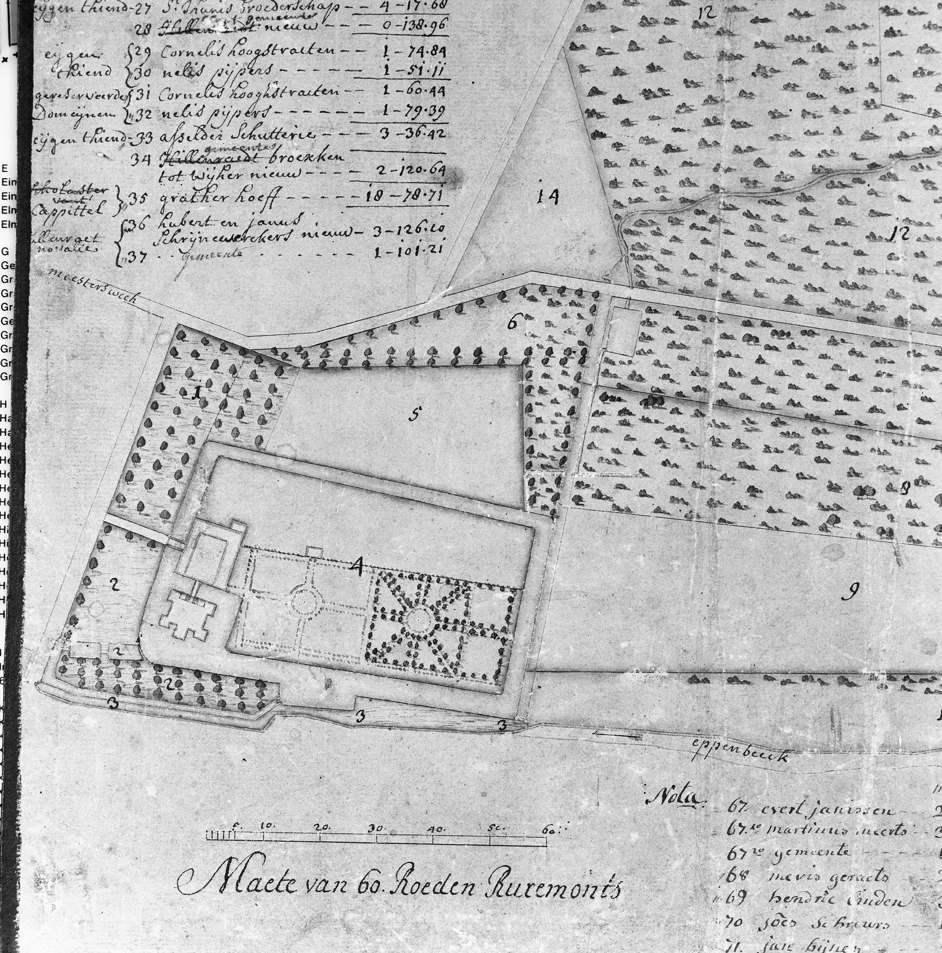 Kasteel Hillenraedt - Hillenraad: uitvergroting kaart in Gemeente Huis, 1753